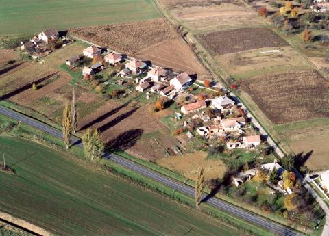 Pusztaszemes, Hungary, aerialphotography